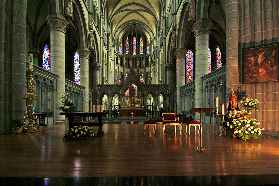 Sint-Maartenskerk, Ypern, Belgien, Flandern, Ieper